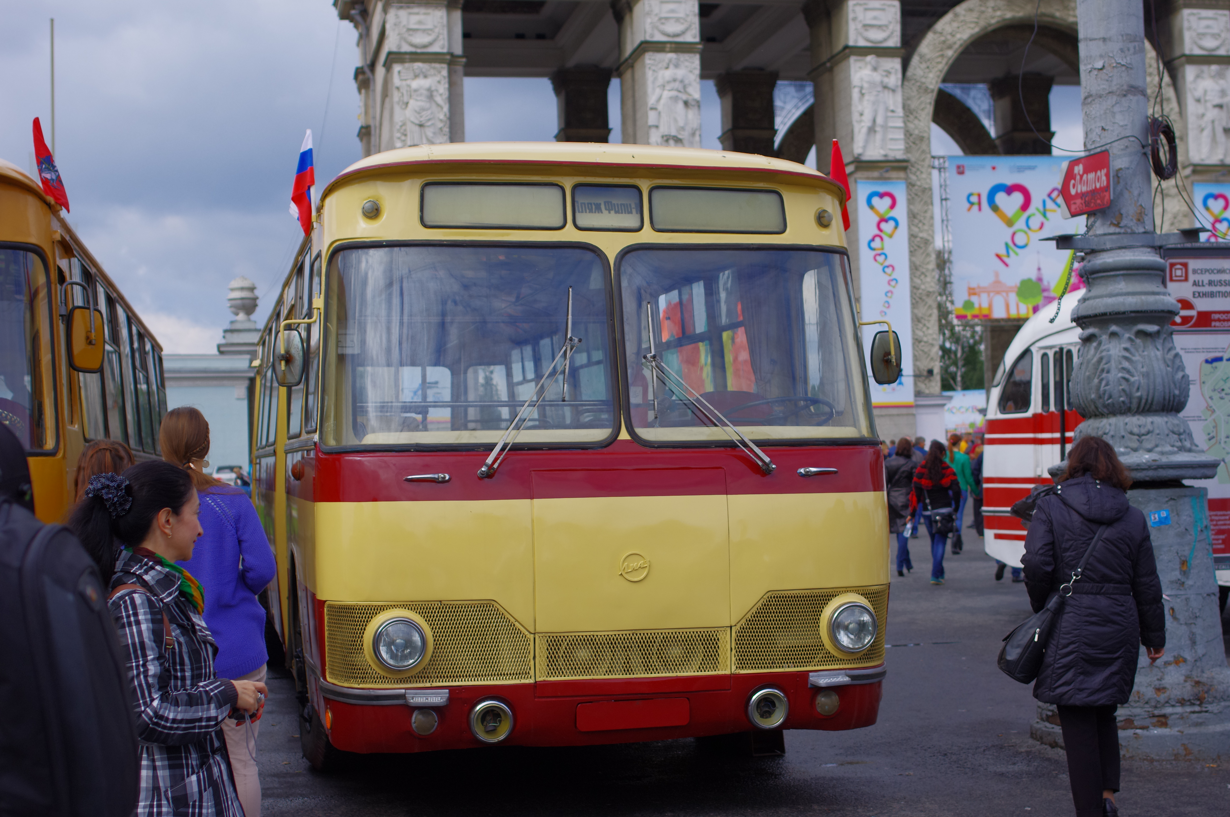 Музейный автобус ЛиАЗ-677 красный из коллекции музея пассажирского транспорта Мосгортранса